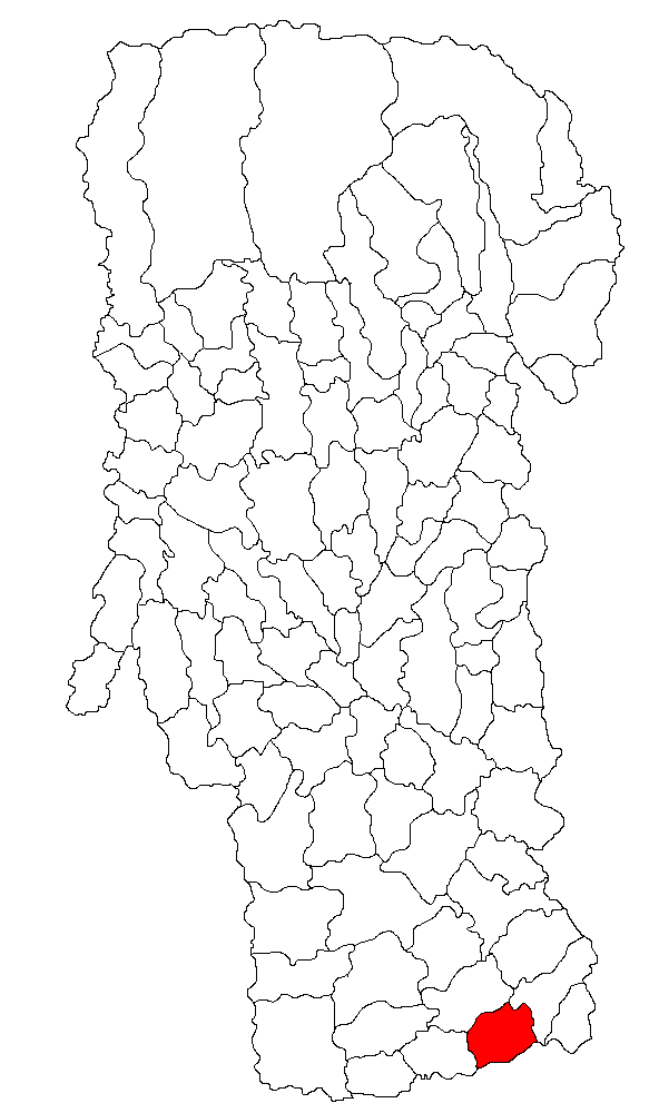 Categorie:Hărţi ale judeţului Argeş